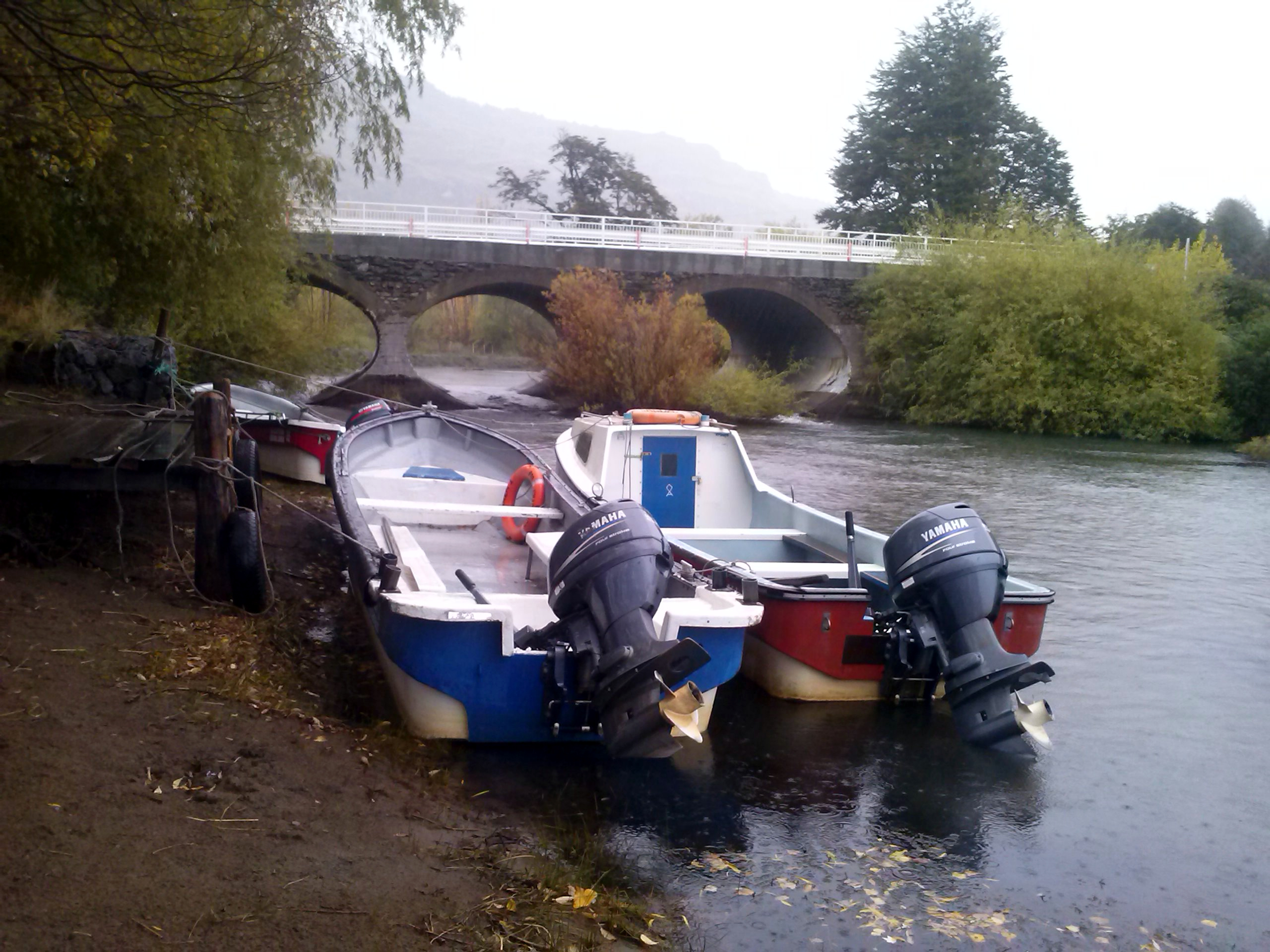 Puente del río Tranquilo, en Puerto Río Tranquilo, comuna de Ibáñez, región de Aysén, Chile